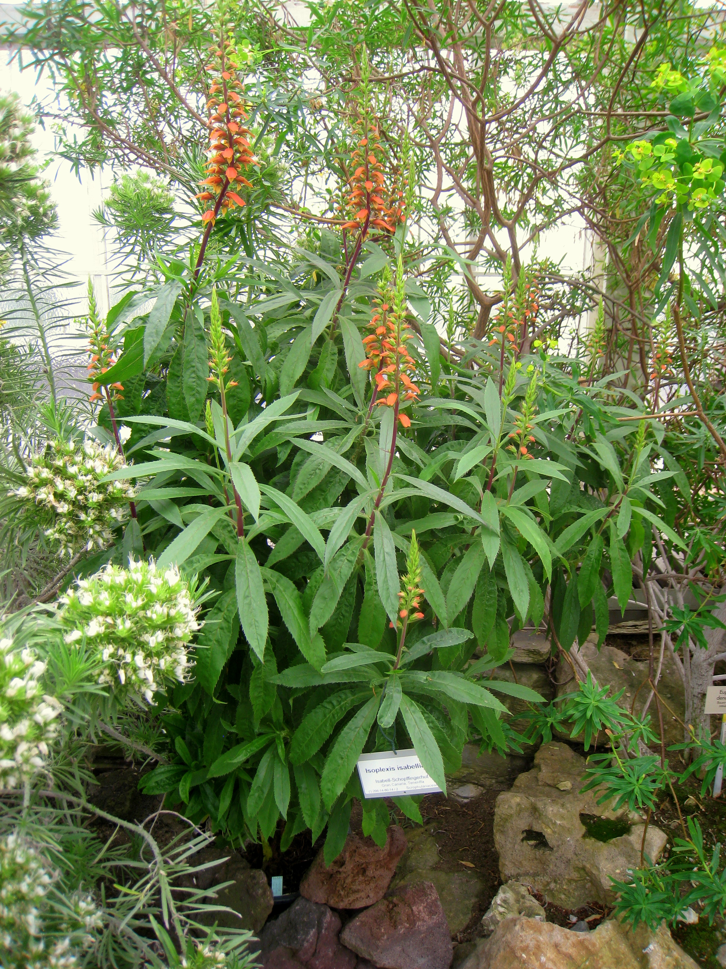 Isoplexis isabelliana specimen in the Botanischer Garten, Berlin-Dahlem (Berlin Botanical Garden), Berlin, Germany.